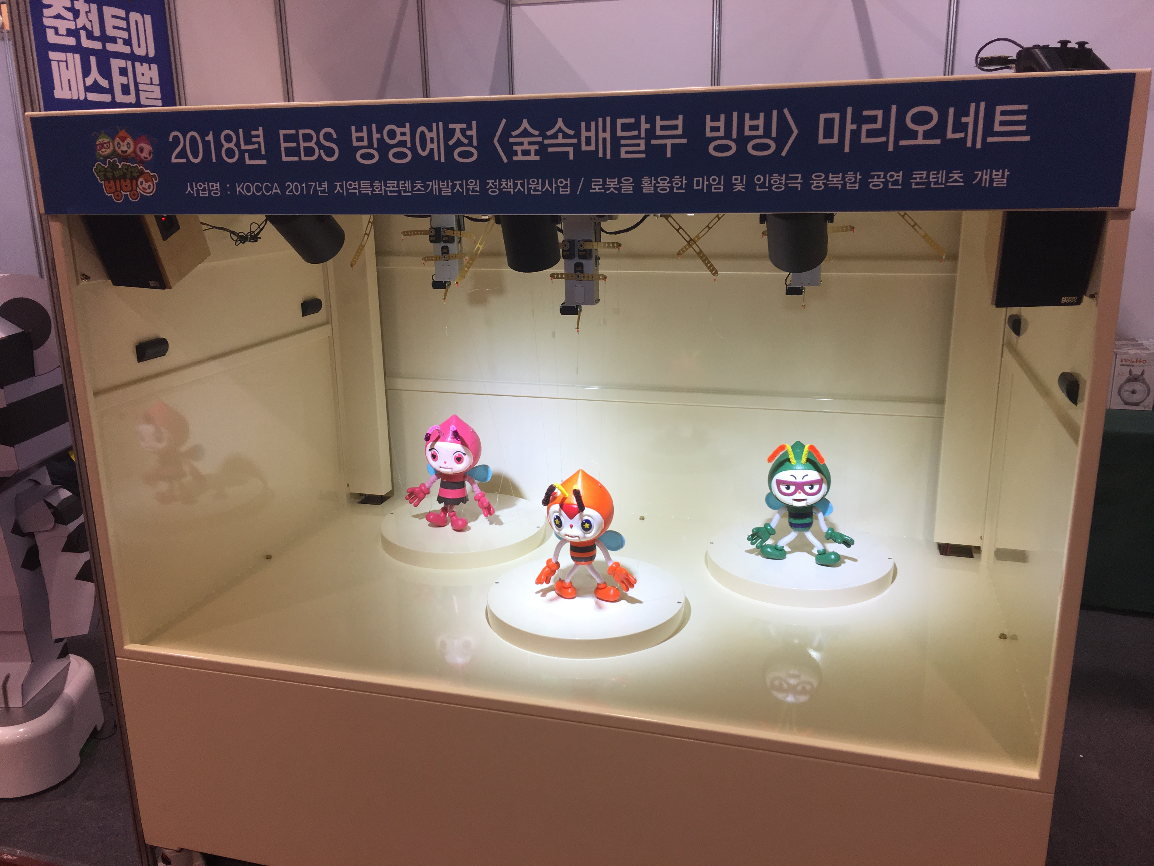 2017년 9월 14일 춘천 토이페스티벌 스마트토이